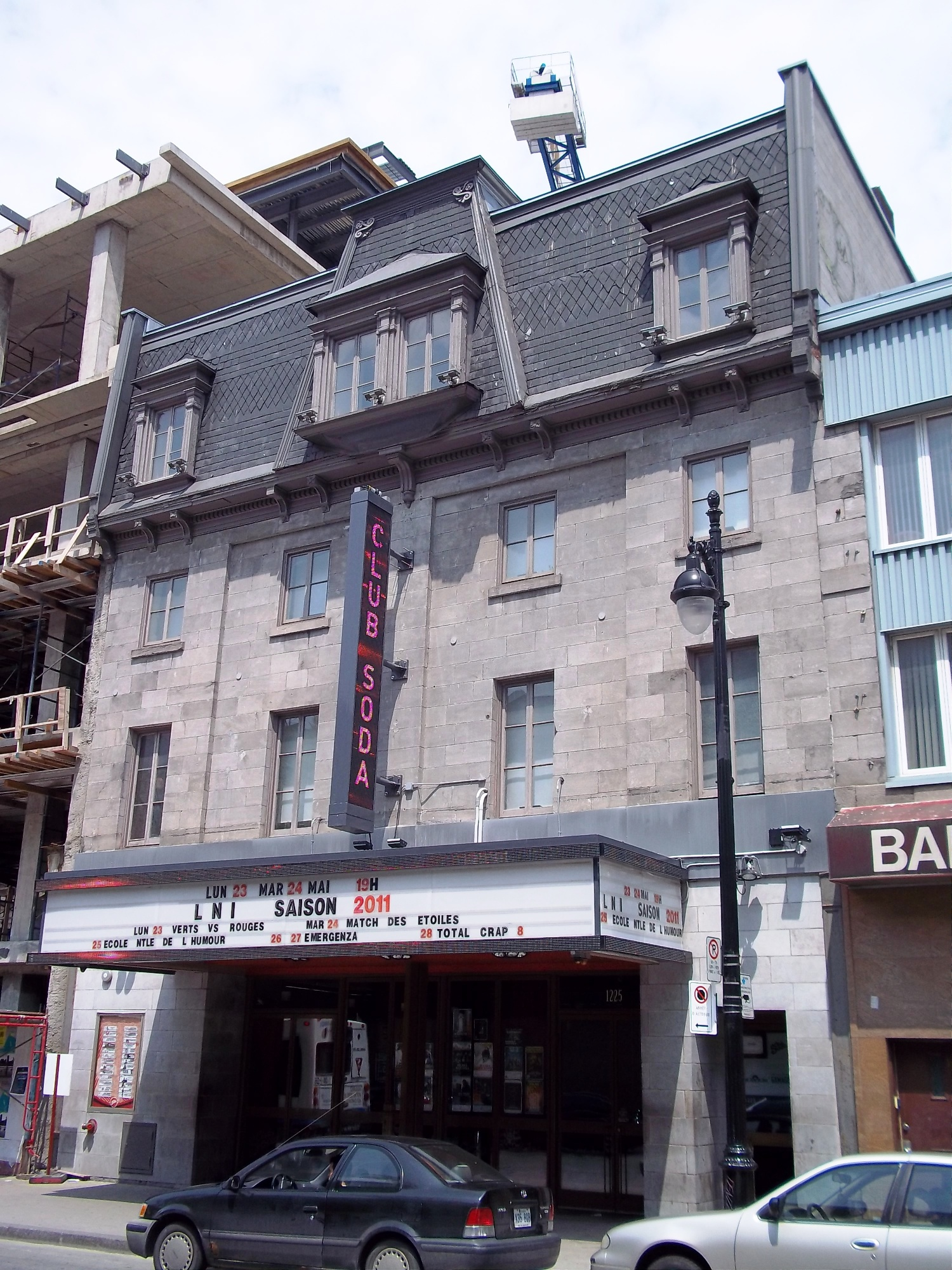 Club Soda, boulevard Saint-Laurent, Montréal